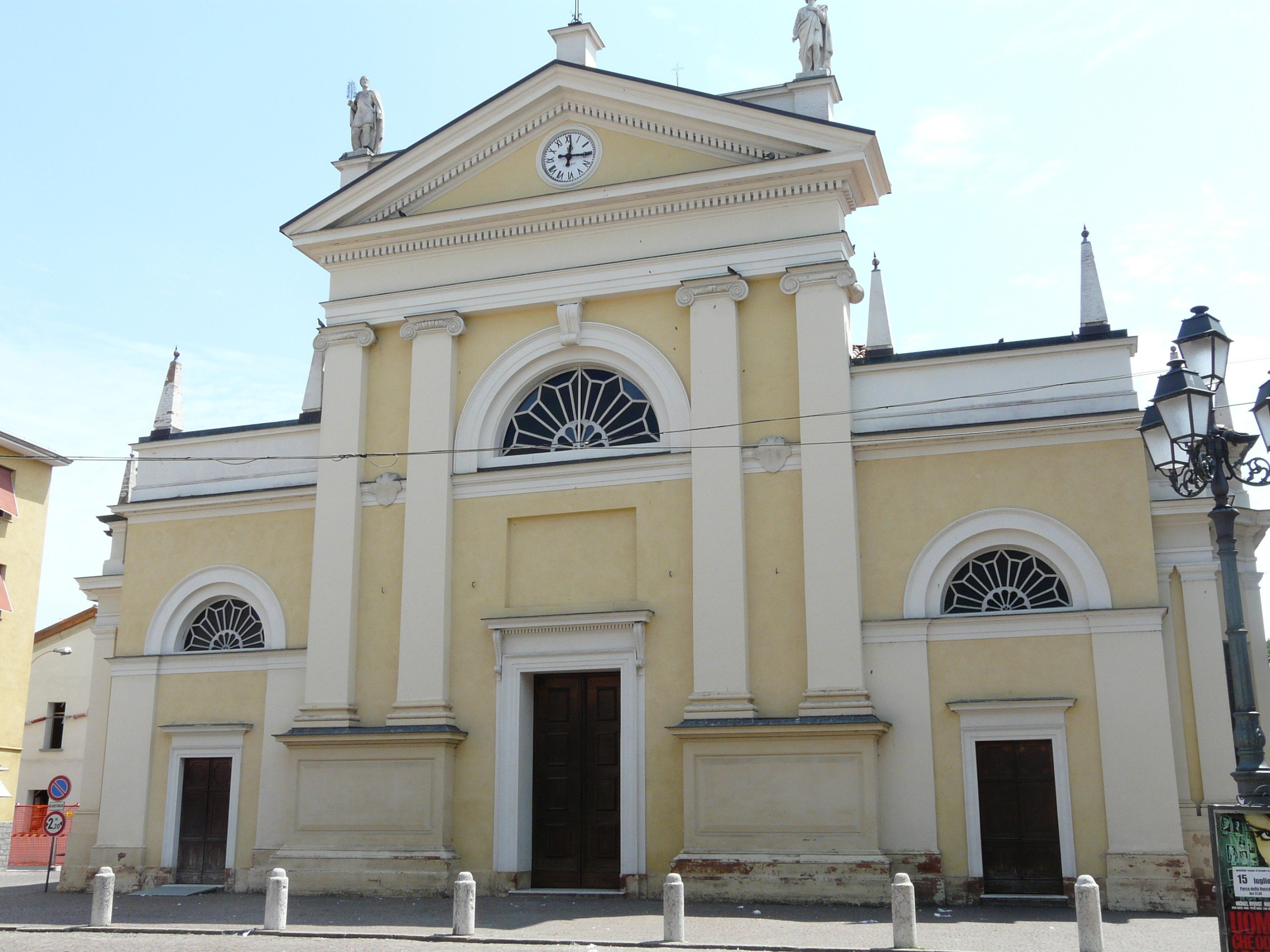 Chiesa dell'Annunciata, San Secondo Parmense, Emilia-Romagna, Italia